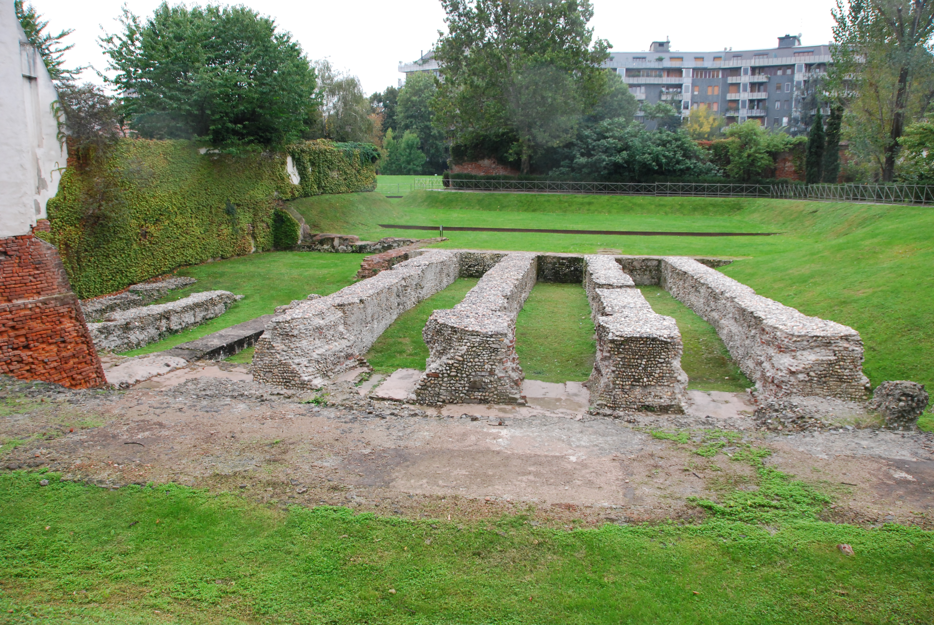 Parco dell’Anfiteatro romano - MIBAC This is a photo of a monument which is part of cultural heritage of Italy.